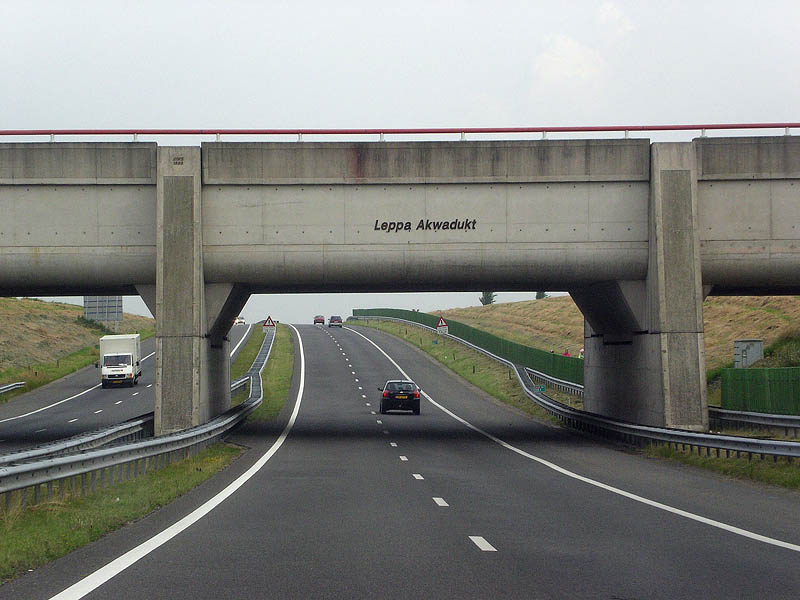 A32 Richting Leeuwarden, ter hoogte van het Leppa Akwadukt